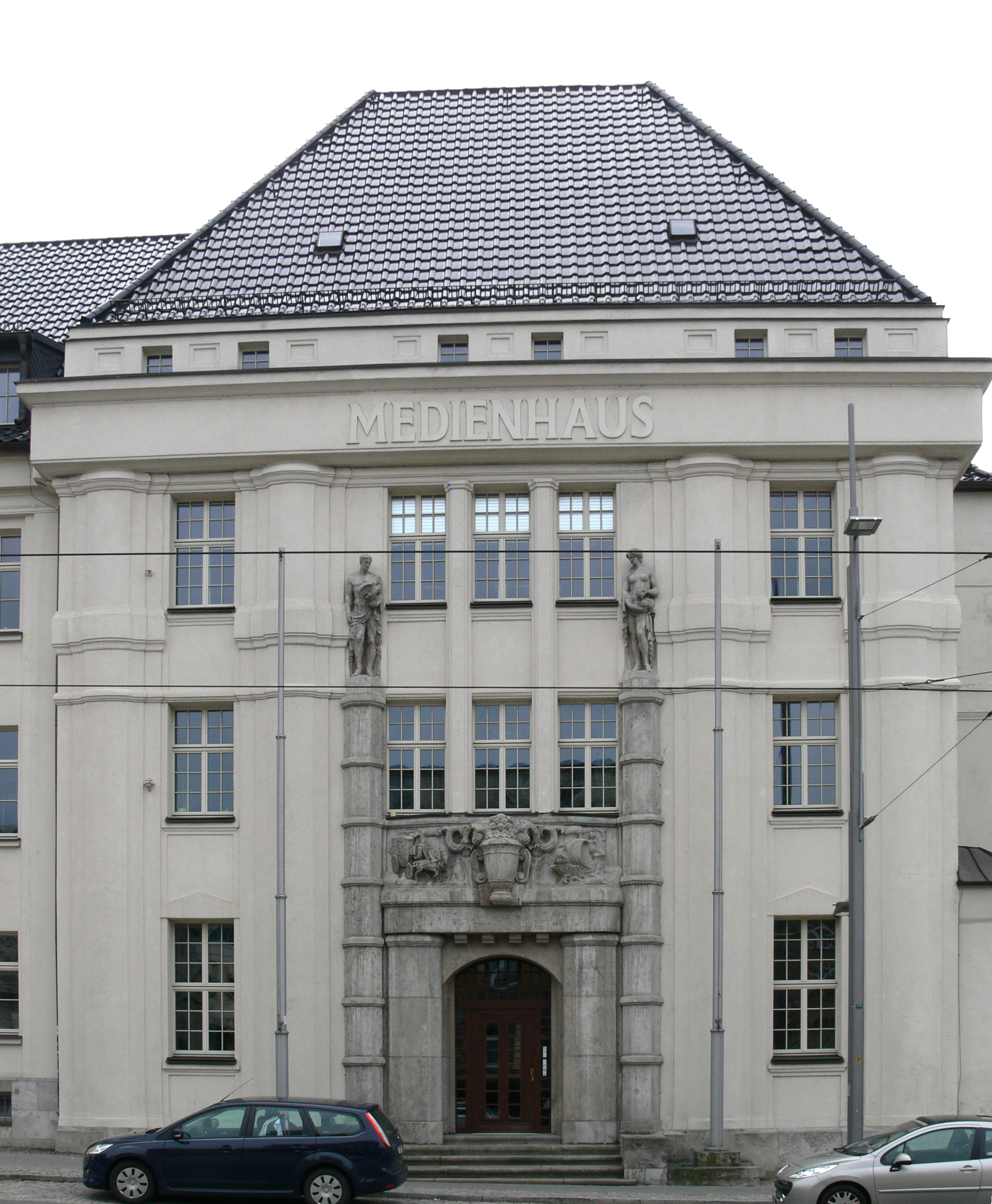 Medienhaus Chemnitz (früher Handelskammer), Carolastraße, Chemnitz